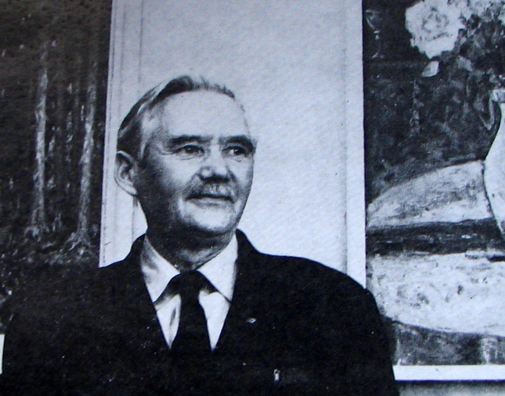 Zygmunt Hyży